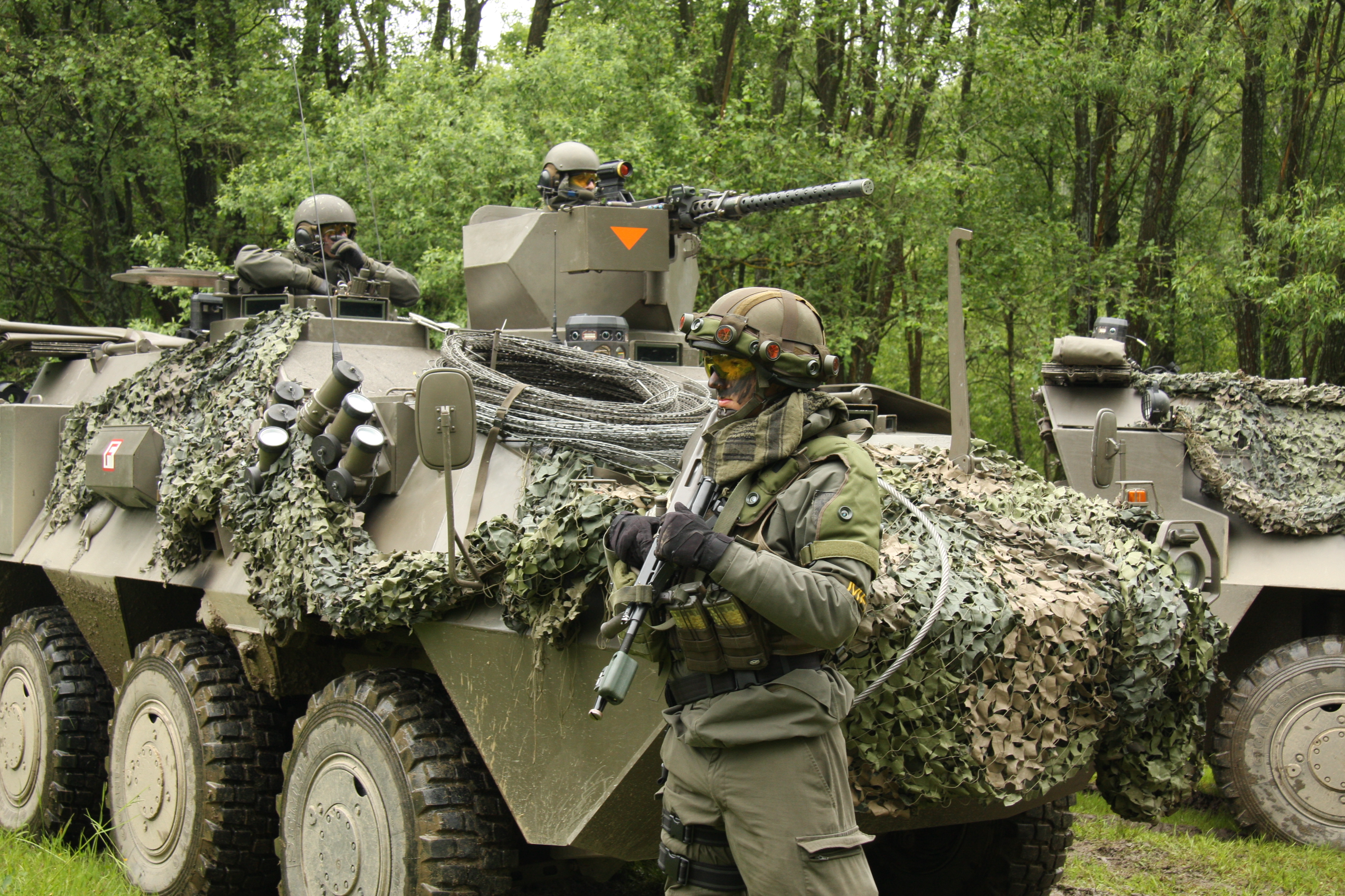 (c) - Das Jägerbataillon 17 bei der Übung European Advance 2013 (EURAD13)